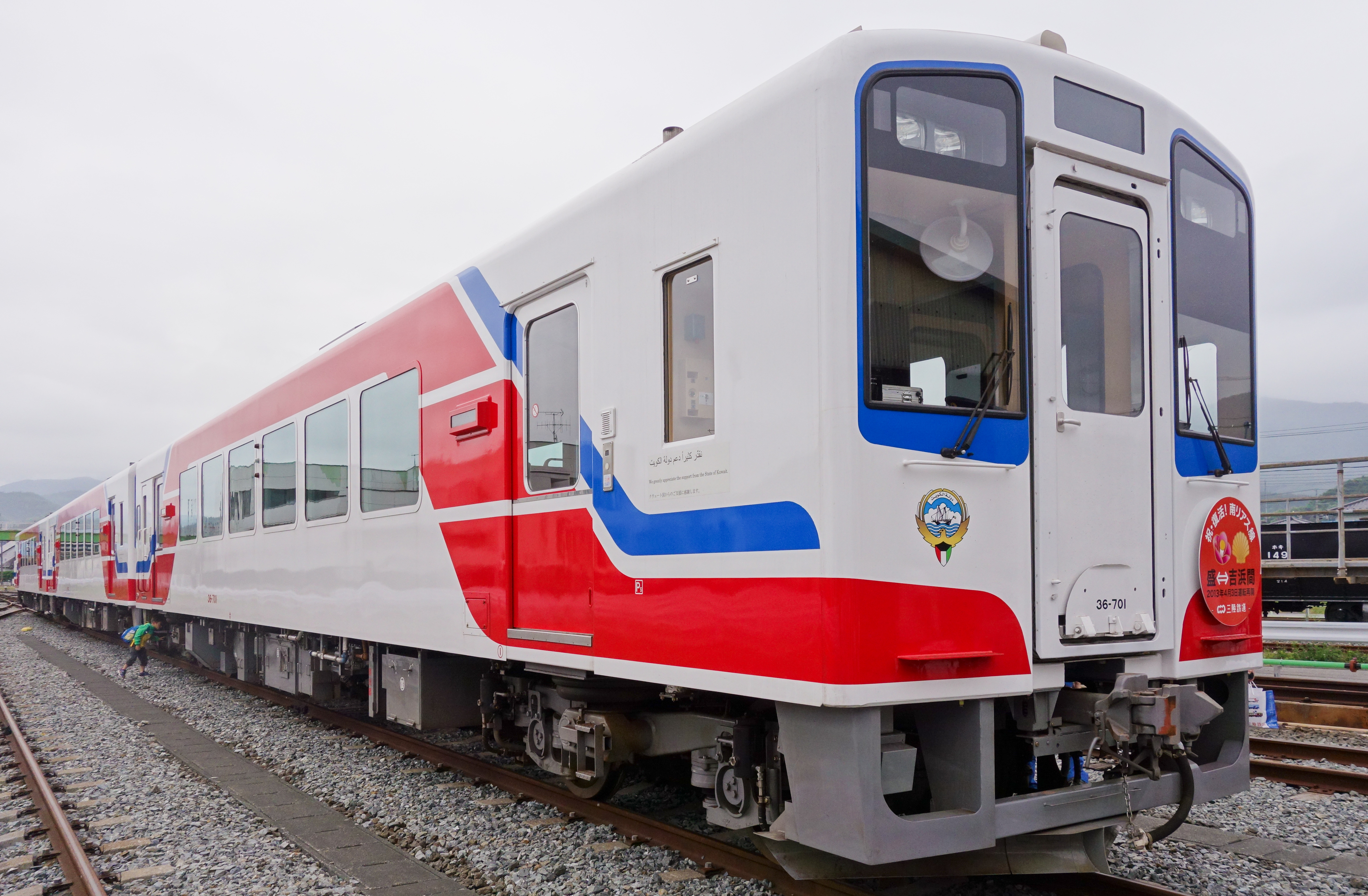 三陸鉄道 手前から36-701、702、703 （クウェート国からの義援基金により購入） 車輌側面には、クウェート国への感謝の言葉がアラビア語・英語・日本語で書かれている。 （南リアス線運行本部検修線、大船渡市盛町木町4-4、2013年6月30日）